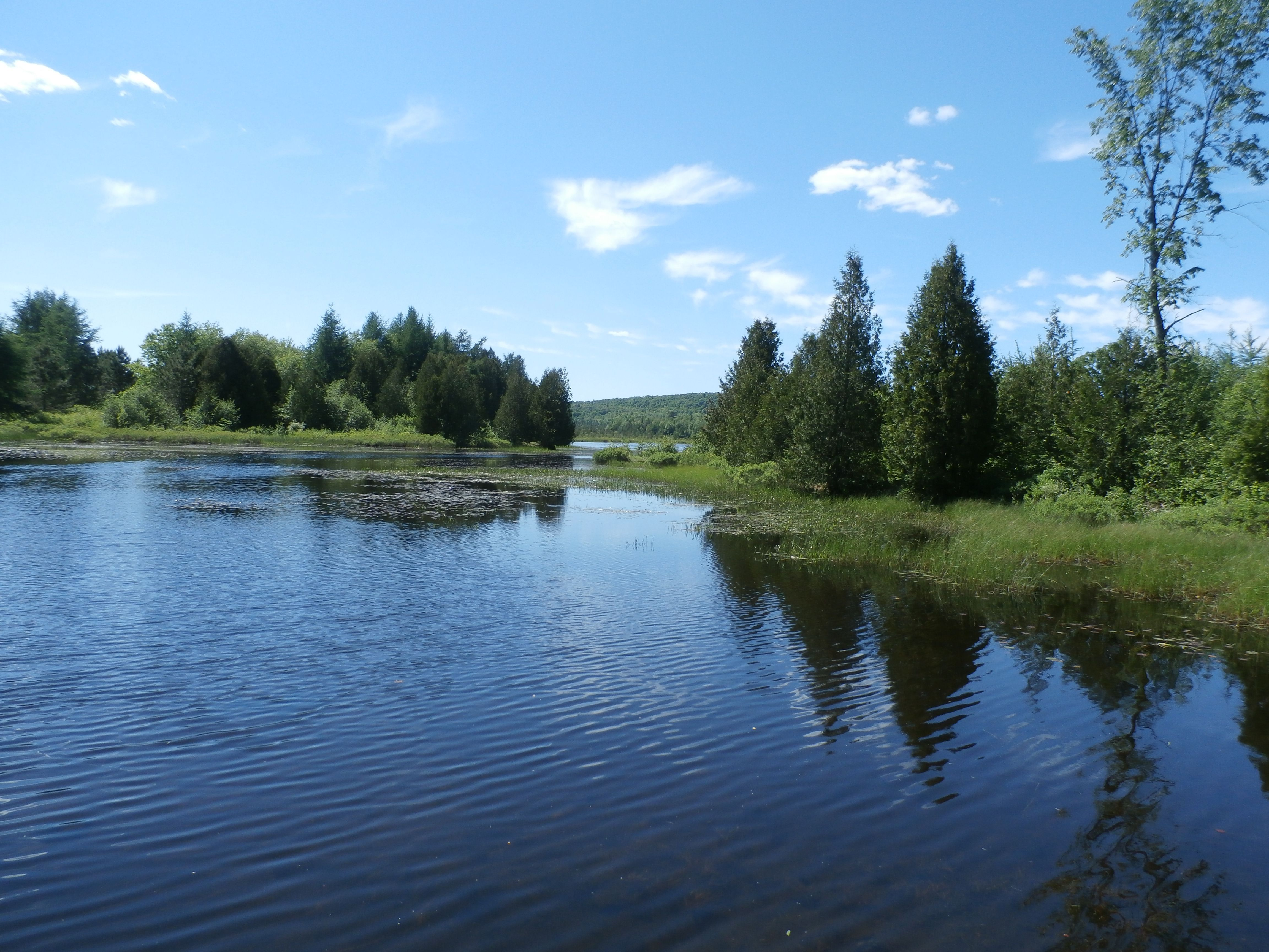 Lac Vaseux traversée par la rivière Weedon.